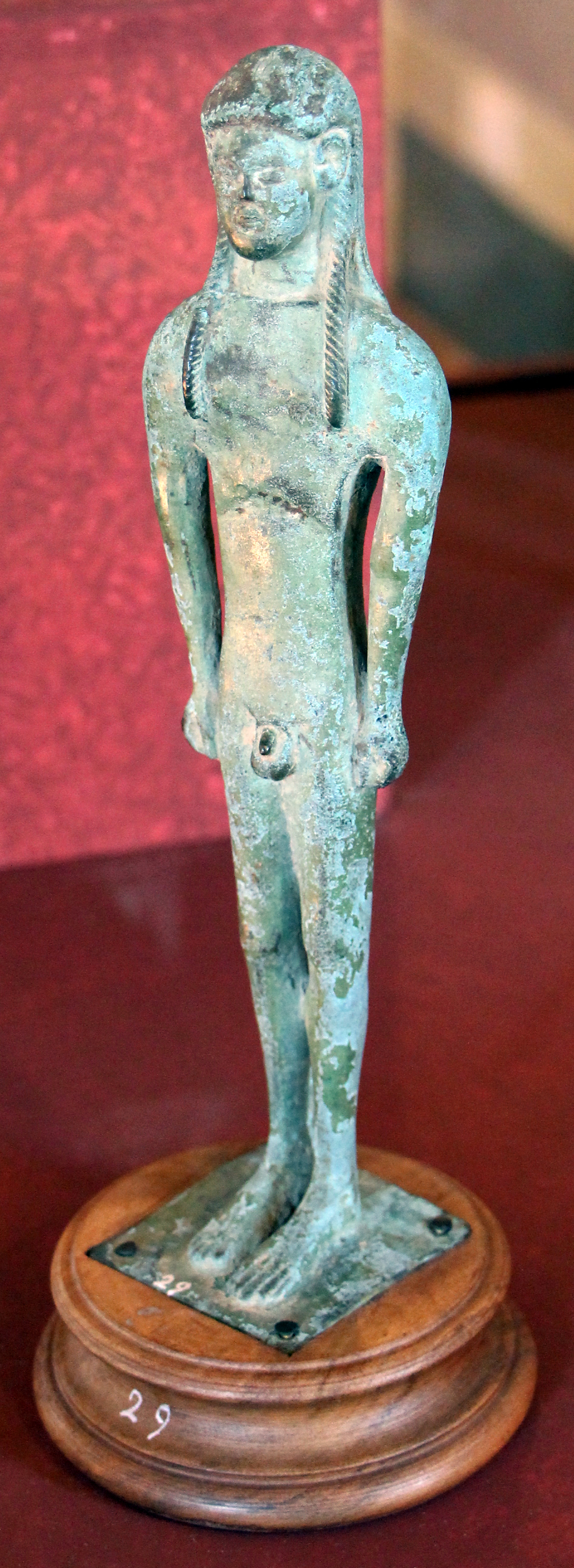 Villa Corsini a Castello - MIBAC This is a photo of a monument which is part of cultural heritage of Italy.